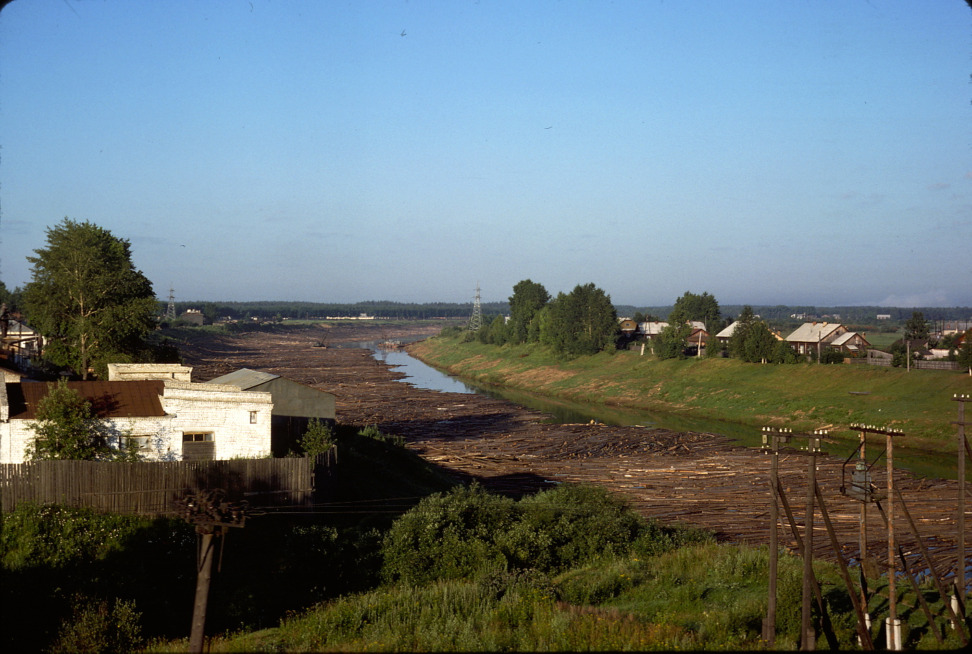 Russie occidentale-Ville de Bouï sur la Kostroma-Flottage du bois